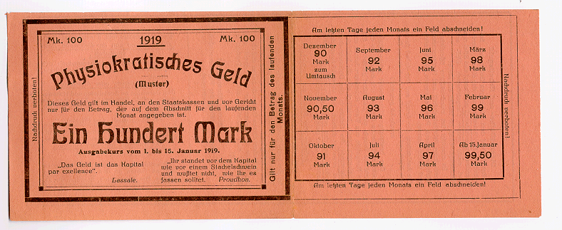 Muster des physiokratischen Geldes